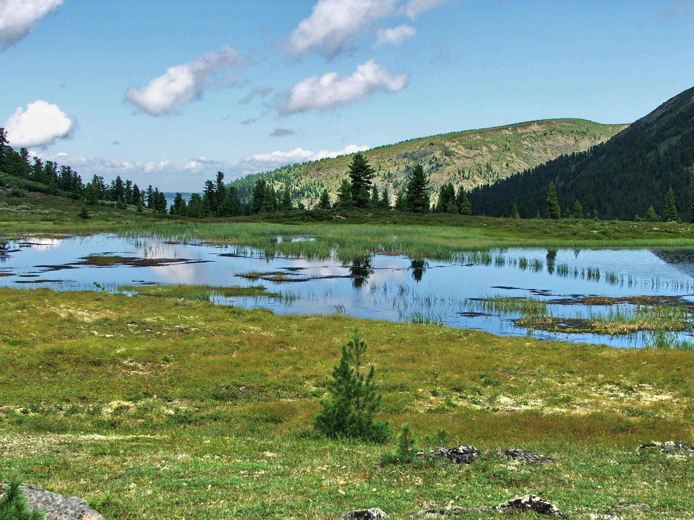 Чертово озеро (хр. Хамар-Дабан, Бурятия)